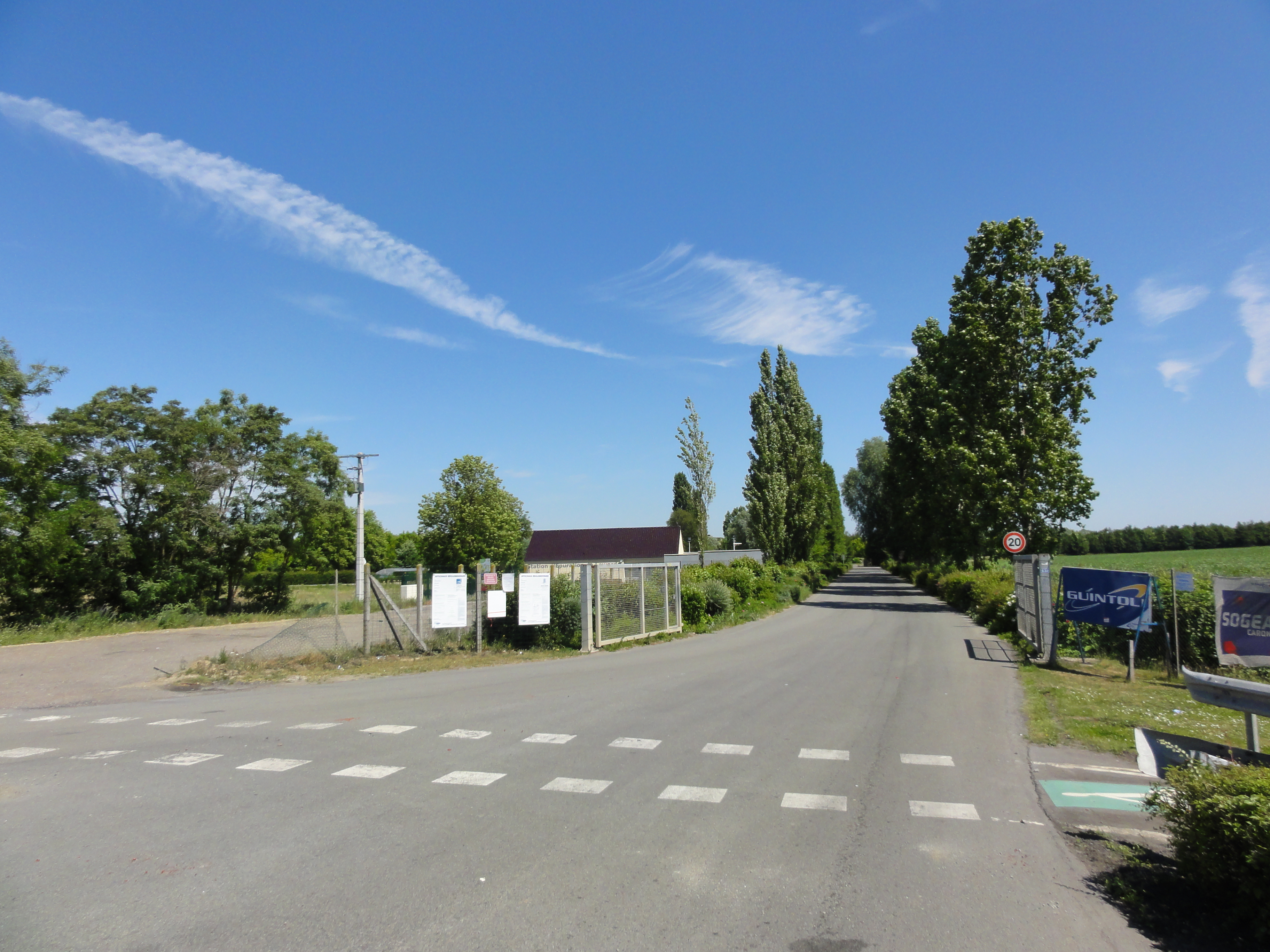 Terril n° 220A dit Cavalier Delloye Nord, Fosse Delloye de la Compagnie des mines d'Aniche, Lewarde, Nord, Nord-Pas-de-Calais, France.